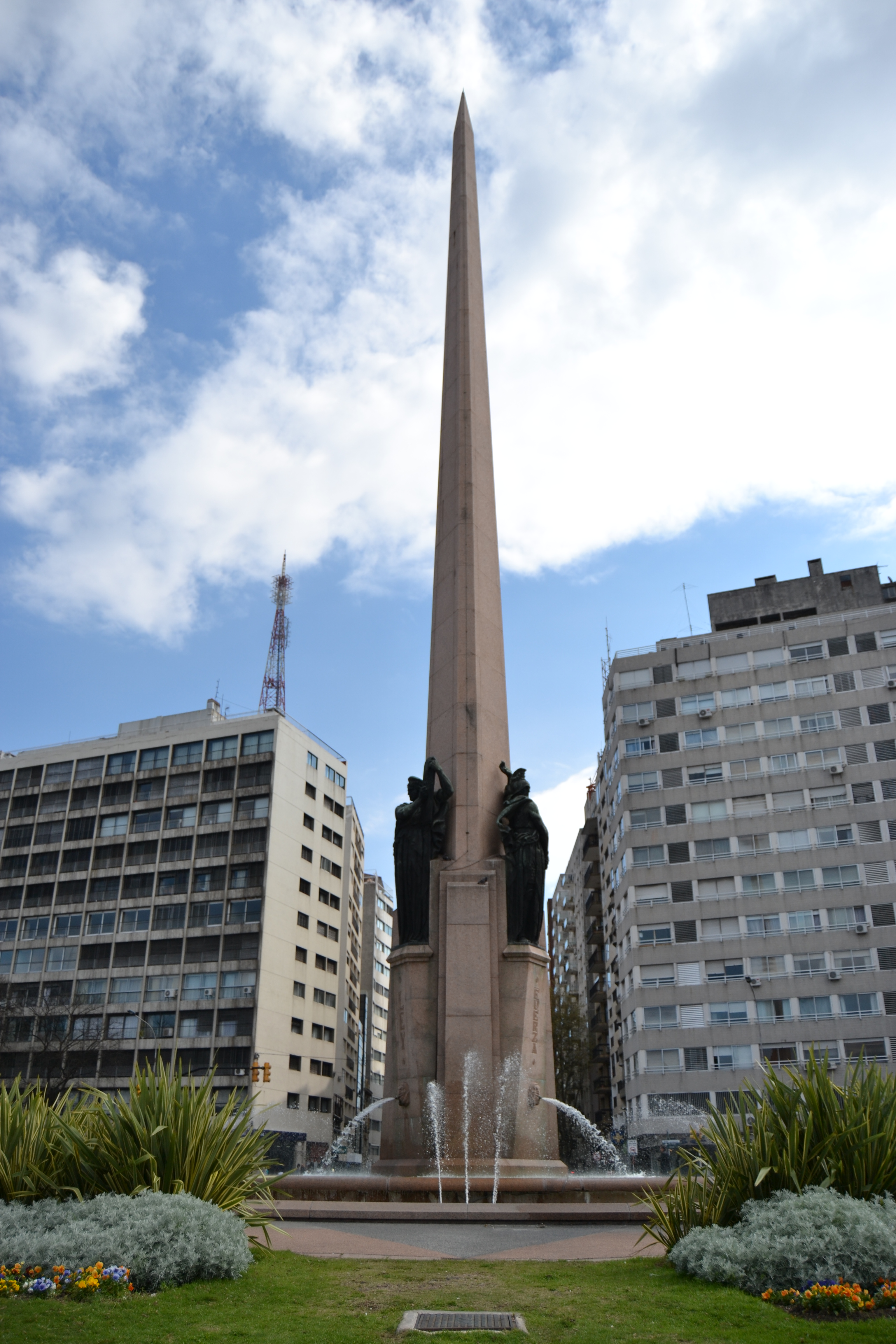 Obelisco a los Constituyentes de 1830. Ubicada en el departamento de Montevideo